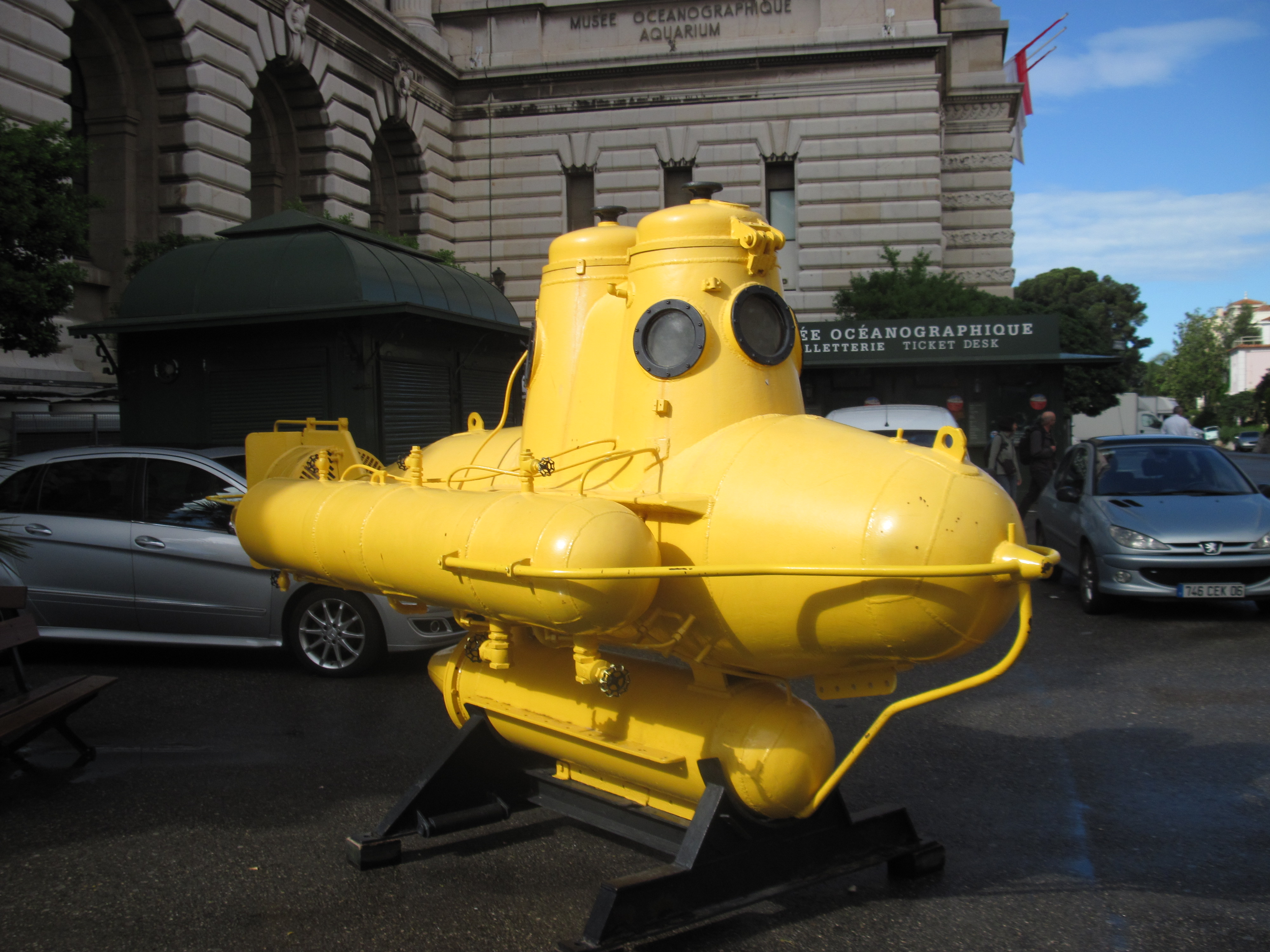 Подводная лодка Жака Ива Кусто в Монако у океанографического музея